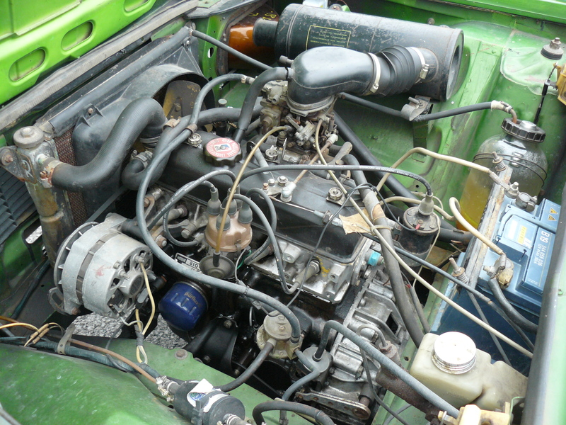 Reims 2012